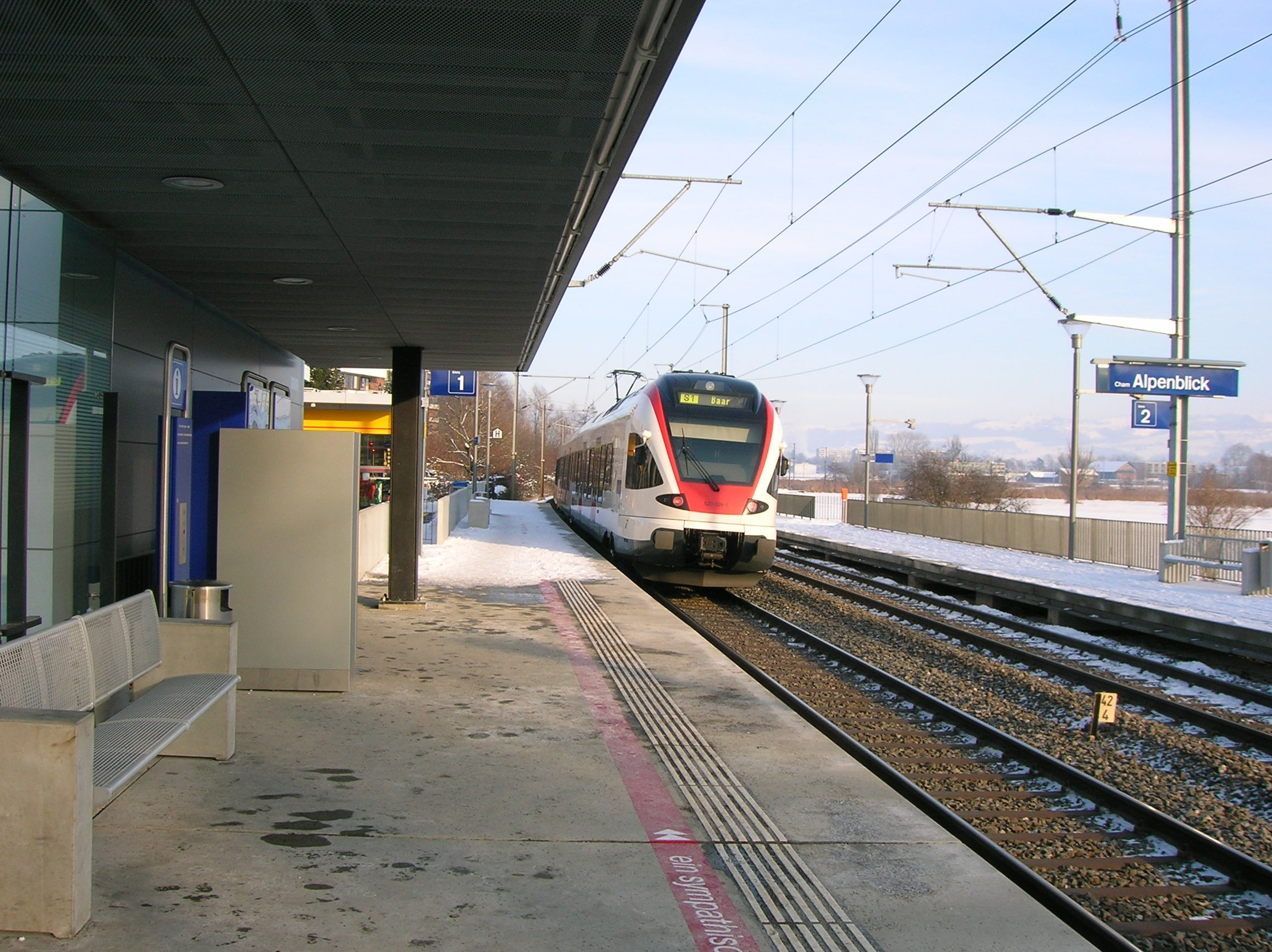 Stadtbahn Zug Train 12